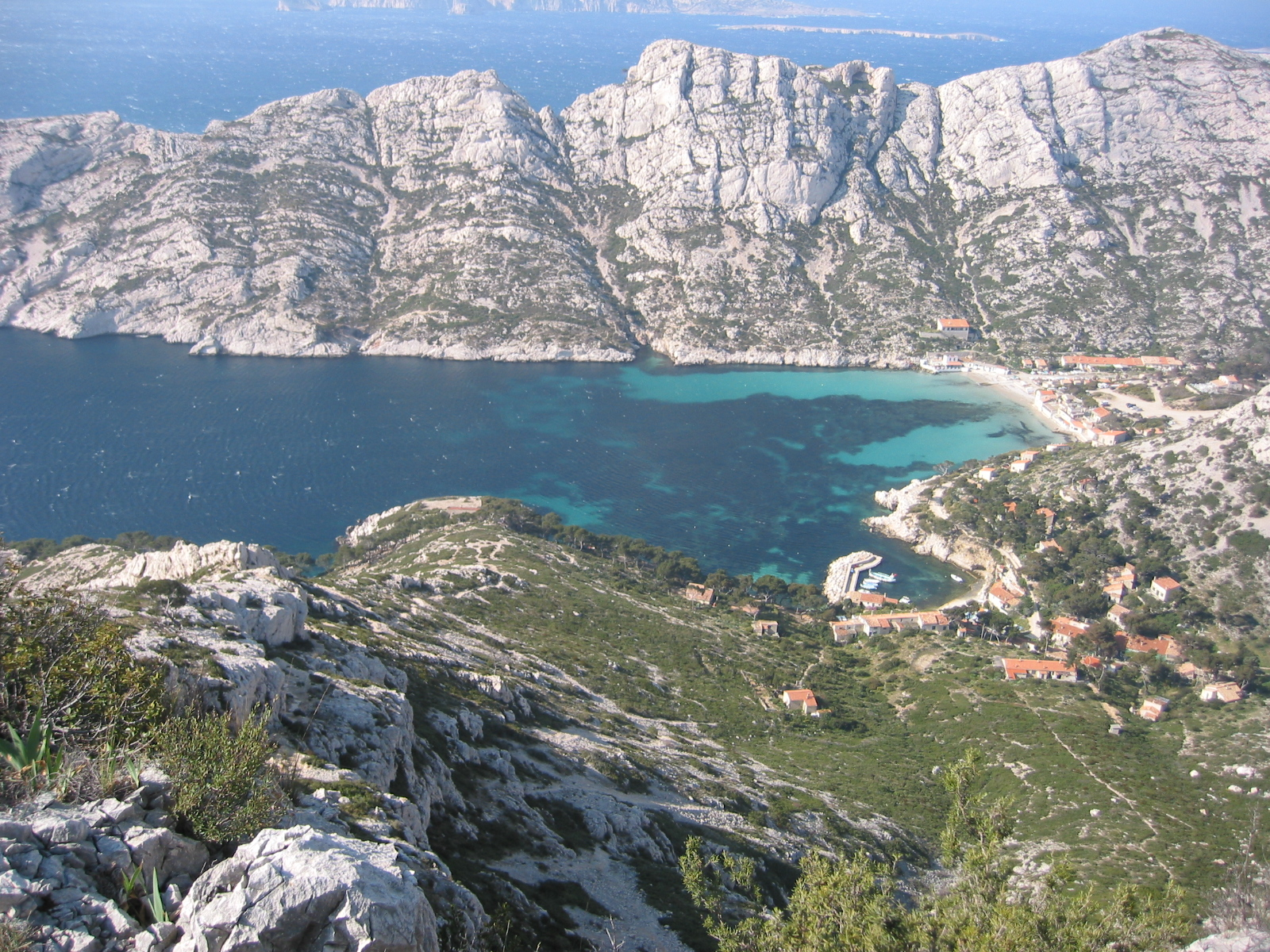 Marseille, Bouches-du-Rhône, France La Calanque de Sormiou Photo prise le 11 avril 2006 Aut : Jddmano